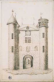 Ancien Châtelet du pont Saint-Pierre à Caen. Pont fortifié servant de porte entre Bourg-le Roi et l’Île Saint-Jean. Servant également d'hôtel de ville, il tient également lieu de beffroi puisqu'il est doté d'une horloge et d'une cloche. Construit au XIIe ou XIIIe siècle, restauré au XIVe après la prise de la ville par Édouard III d'Angleterre, il est finalement détruit en 1755 afin de faciliter la circulation.